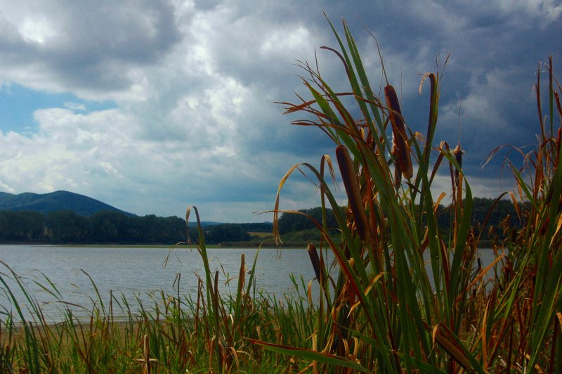 Boleráz reservoir, Slovakia